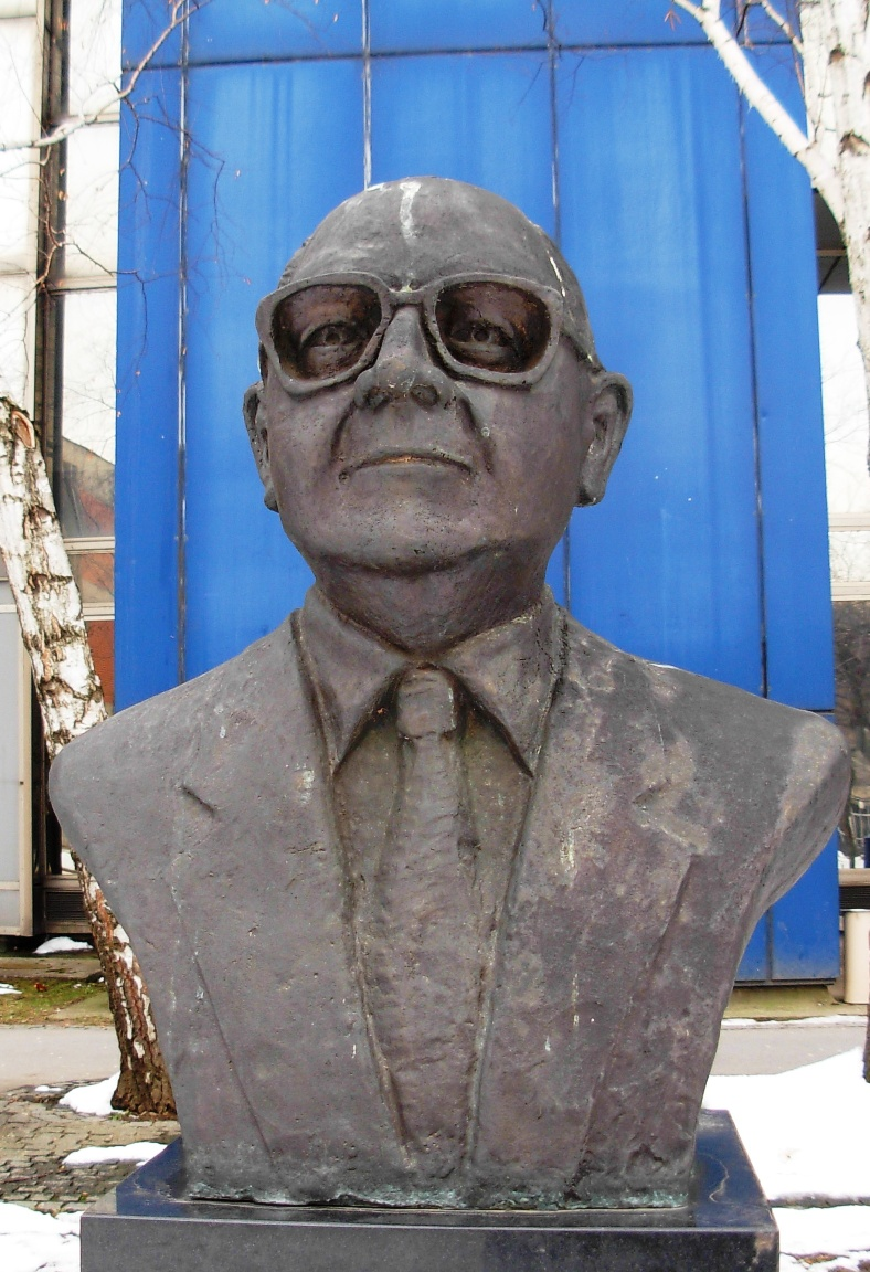 Bista akademika Branislava Bukurova (1909-1986) ispred Prirodno-matematičkog fakulteta u Novom Sadu. Autor je Stjepan Periškić, vajar amater iz Bača.